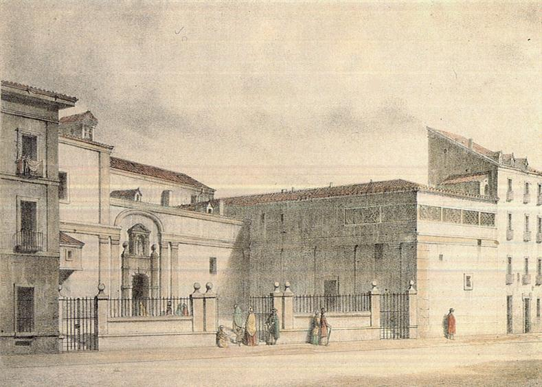 Dibujo de José María Avrial y Flores de la fachada principal en la calle de Atocha nº 30, del monasterio de religiosas agustinas de la Magdalena, demolido hacia 1837, según anota Mesonero Romanos en El Antiguo Madrid (pág. 154). Litografía de la imprenta de la Viuda de Aznar, Madrid.